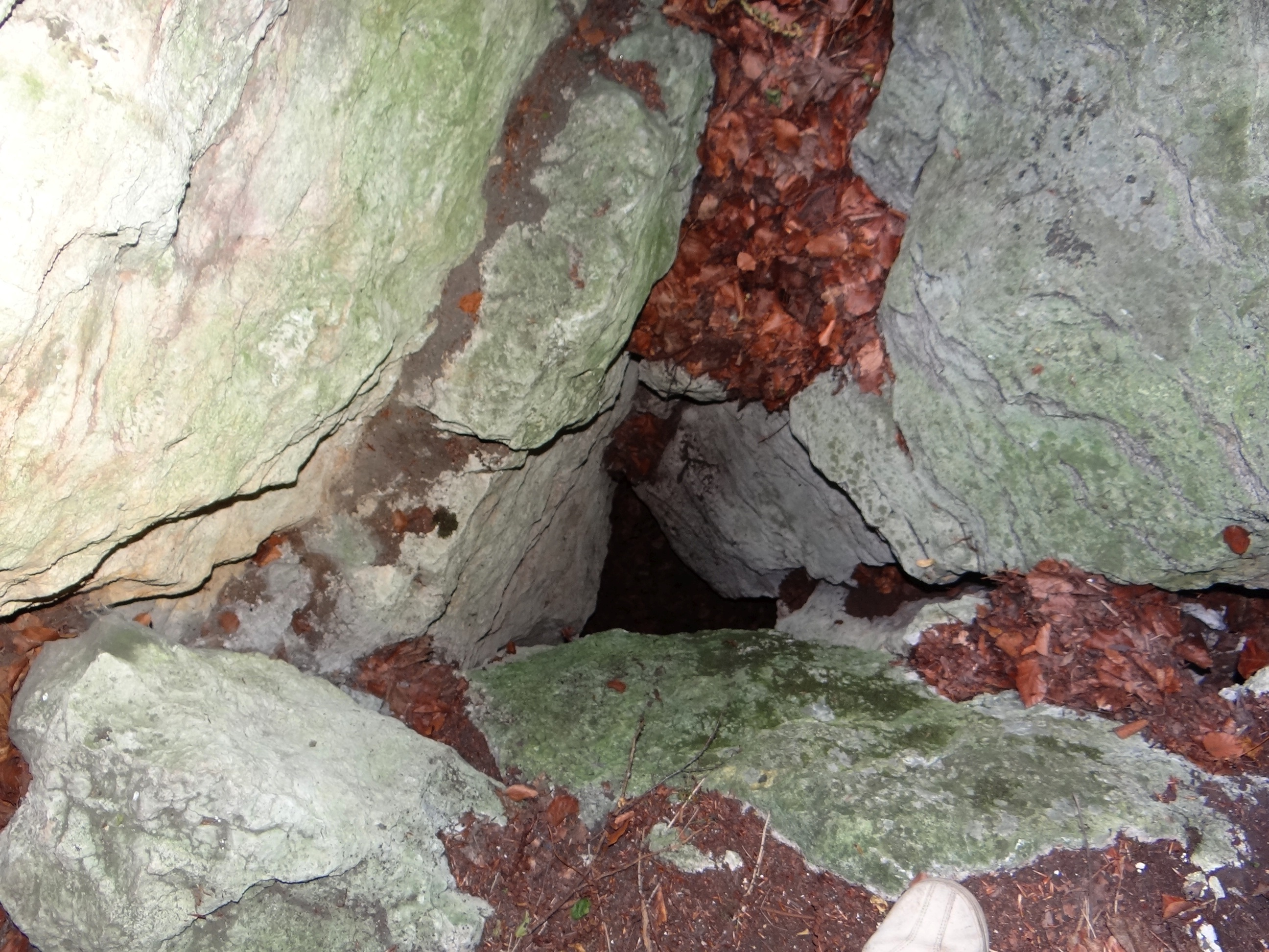 Jaskinia Jaroszowska